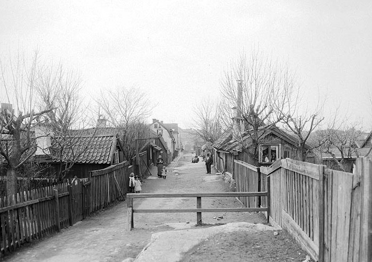 Åsögatan mot väster, Kvarteret LAMPAN. Kvarteret LOTSEN. Kvarteret TJÄRHOVET STÖRRE. Södermalm